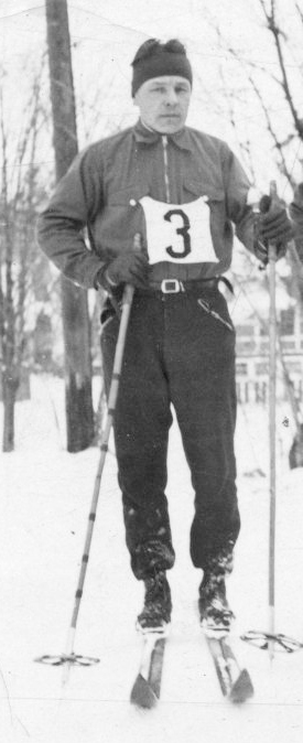 Valmari Toikka, Veli Saarinen, Väinö Liikkanen and Martti Lappalainen at the 1932 Olympics